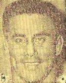 Pepper Gomez dans un programme de catch de Mesquite du 14 avril 1960